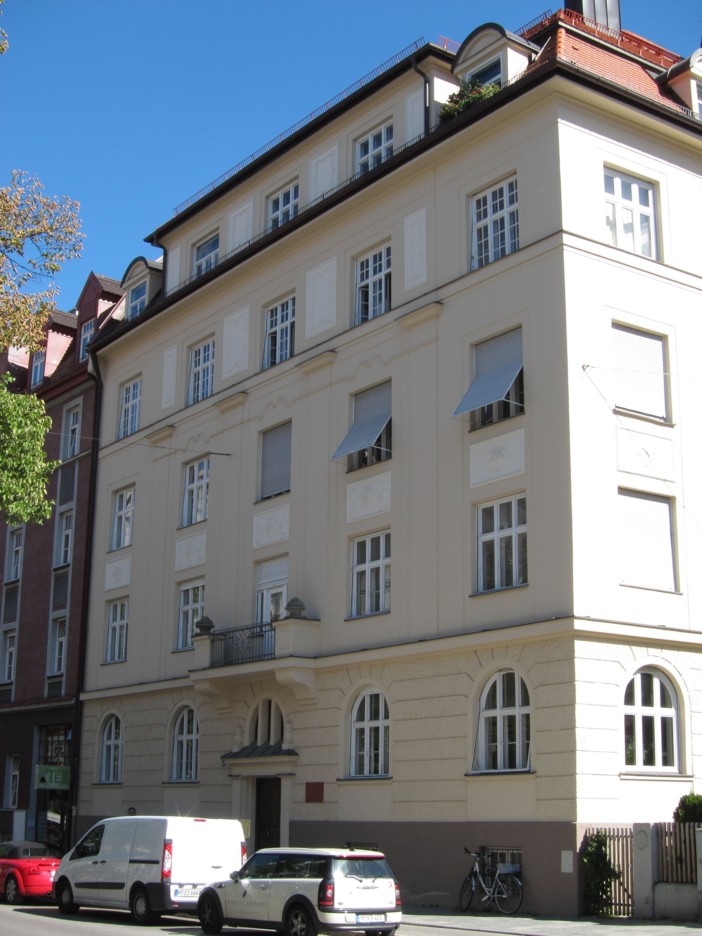 Wendl-Dietrich-Straße 9; Mietshaus, barockisierender Eckbau, mit Reliefs, um 1910; Pendant zu Nr. 5.